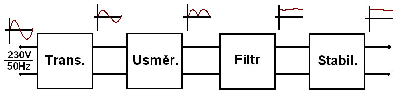 Blokové schéma klasického stabilizovaného zdroje. Transformátor, usměrňovač, filtr a stabilizátor...